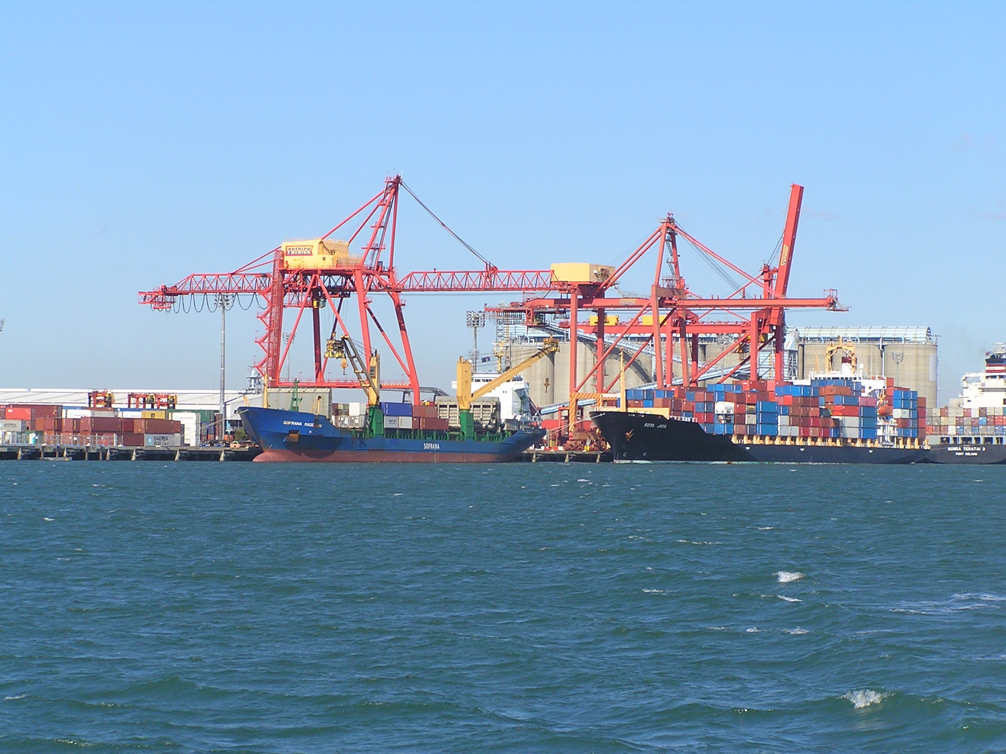 Brisbane Docks 2004